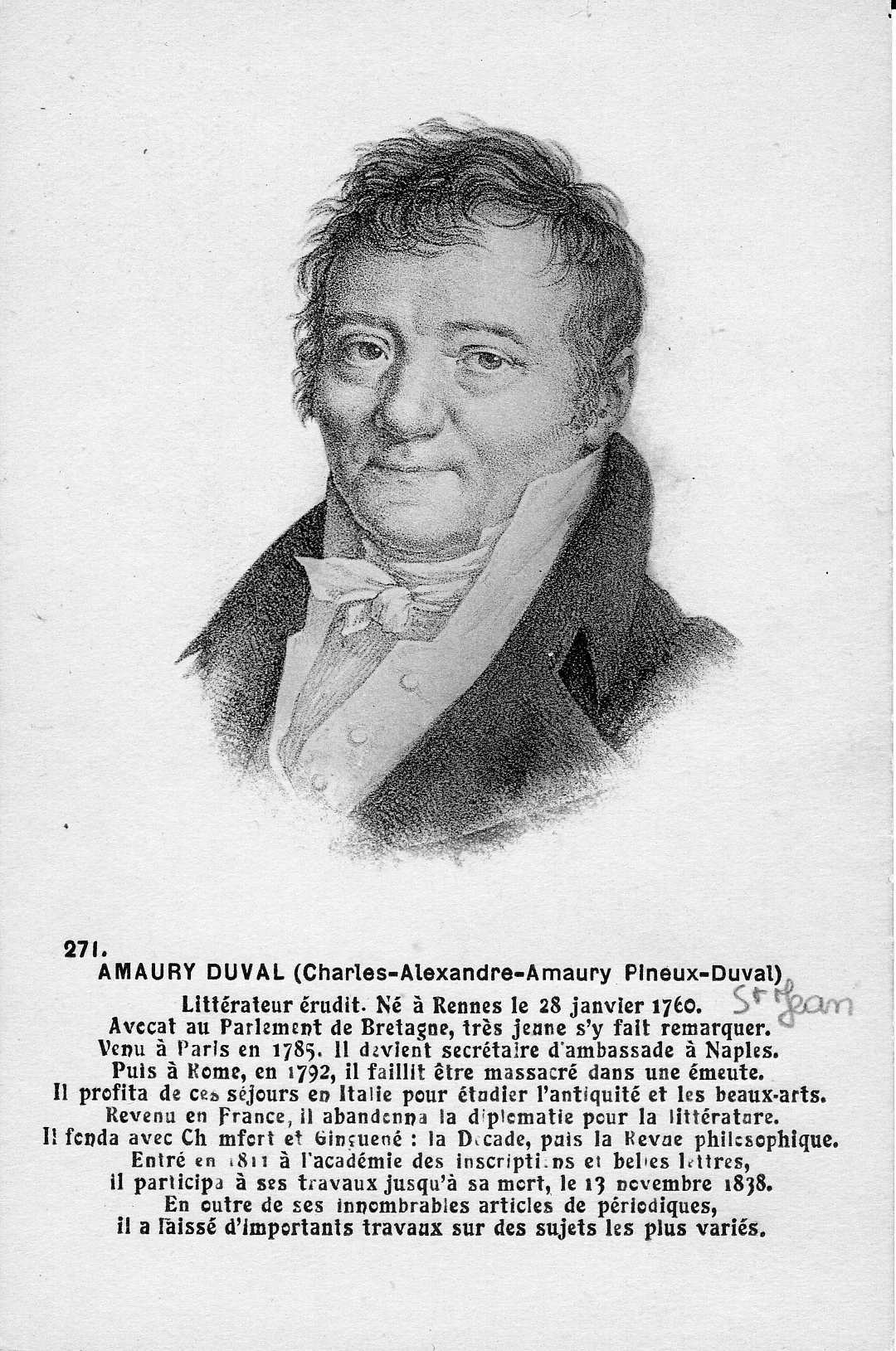 Portrait d'Amaury Duval (1760-1838), historien et diplomate. Carte postale F. Château, conservée aux Archives de Rennes, 100 Fi 453